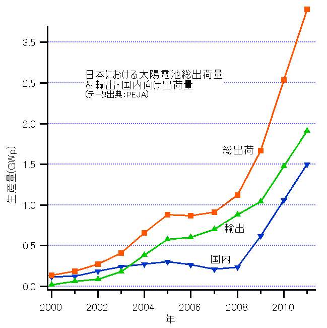 2011年のデータを追加しました。